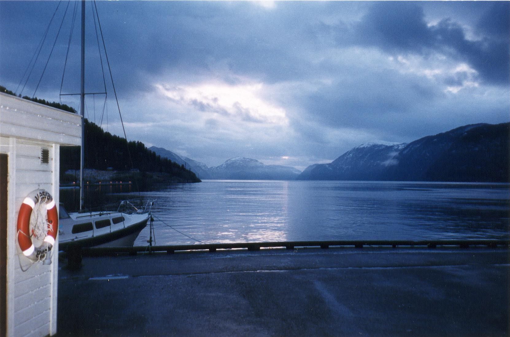 Vue du fiord depuis le village